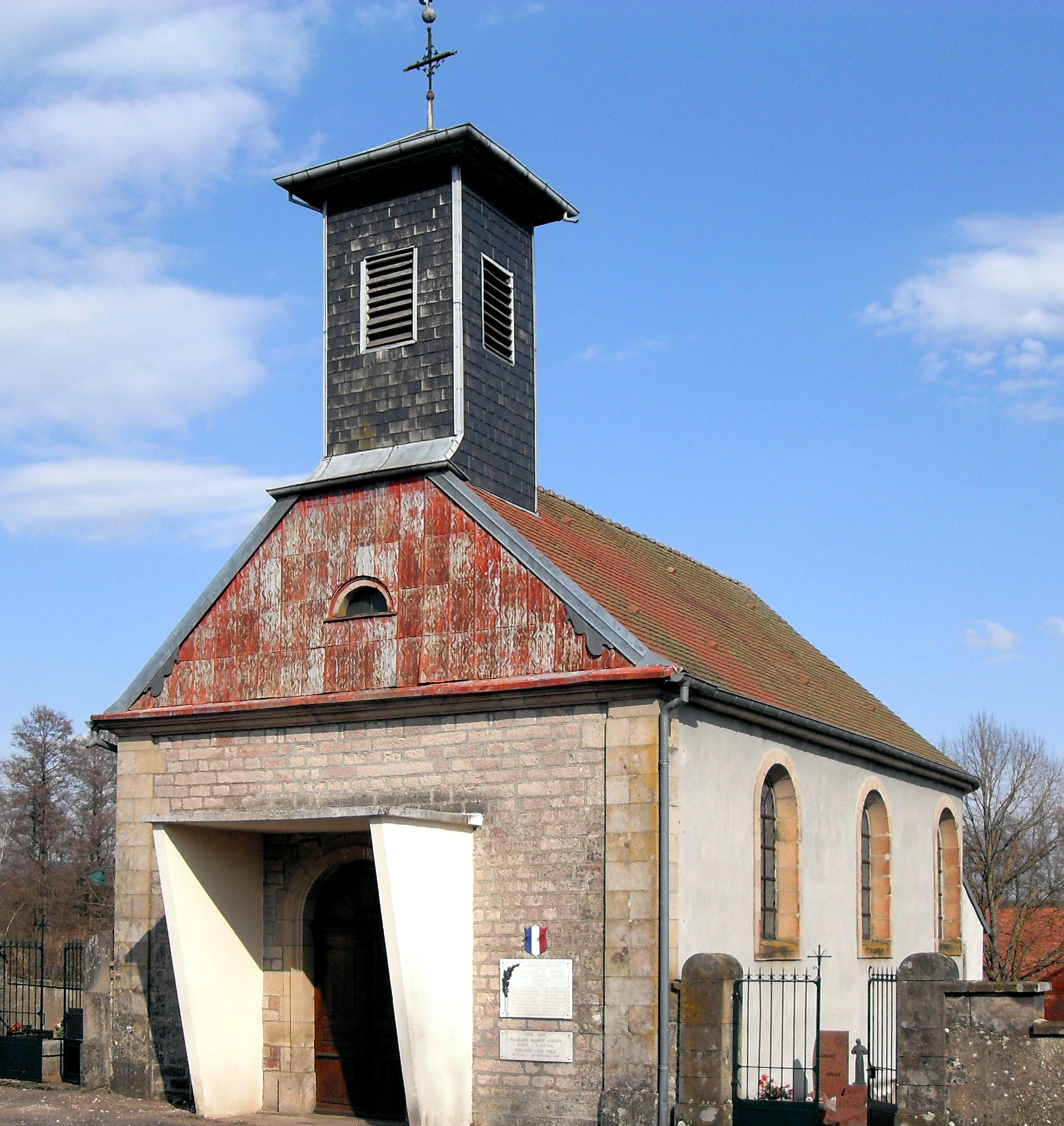 La chapelle d'Errevet